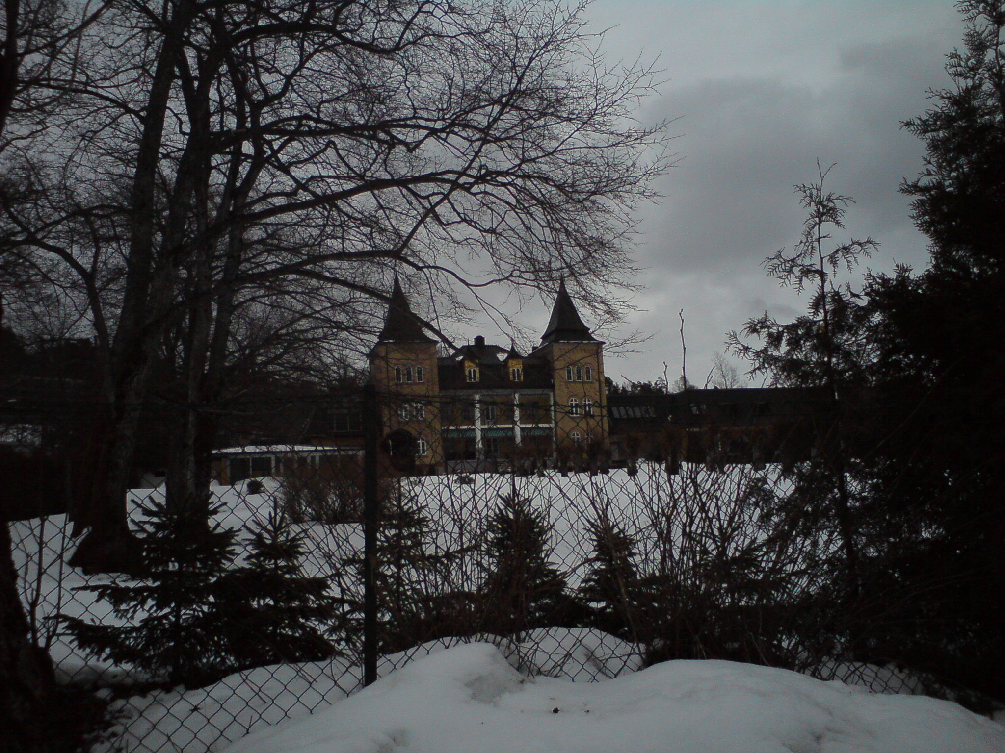 Gamle bygninger i Moss